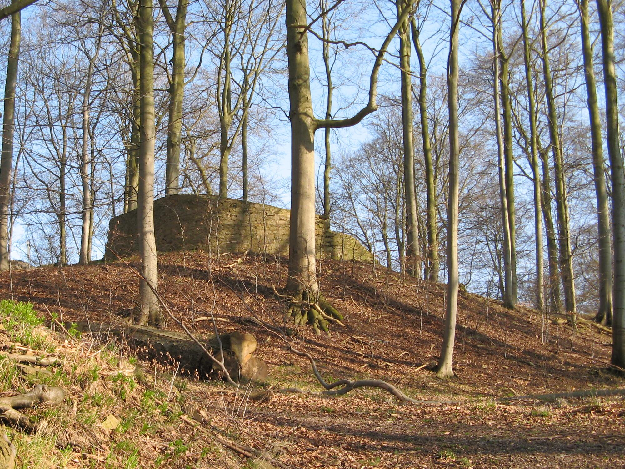 Burgruine Rodenberg auf dem "Alten Turm" (Hausberg) nördlich von Rotenburg an der Fulda